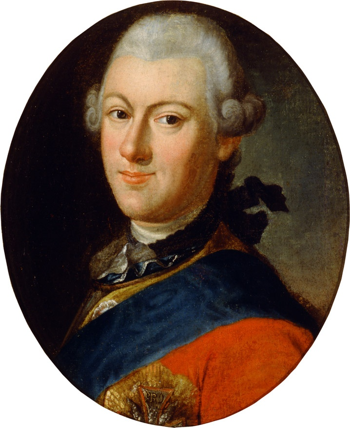 Беларуская (тарашкевіца): Партрэт Міхала Казімера Агінскага (Michał Kazimier Aginski).